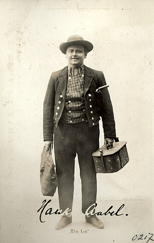 Norwegian actor Hauk Aabel Kilde: Bildet er langt over 70 år